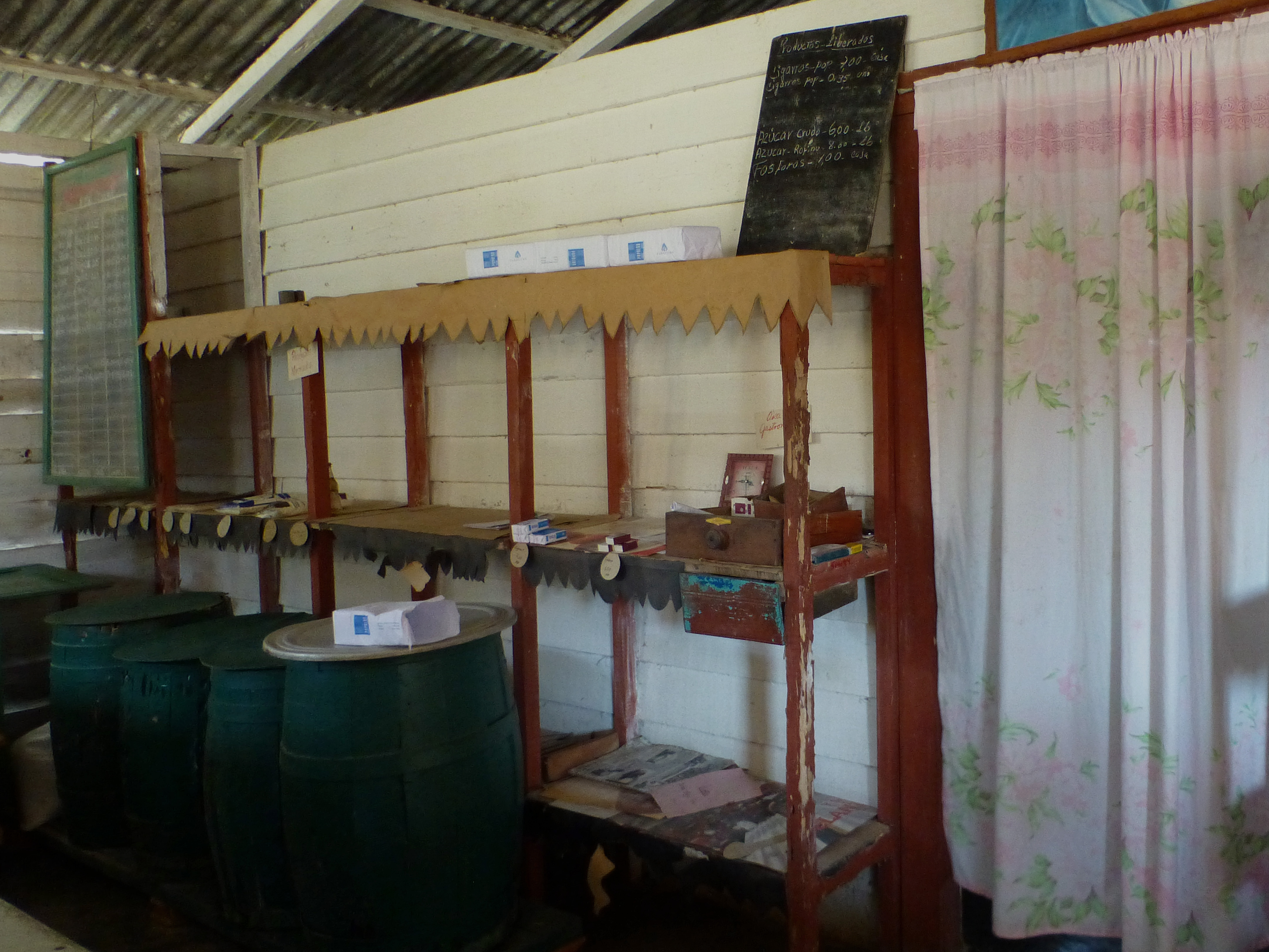 Cuba : petit magasin dans un village de la vallée de Viñales. Il s'agit d'une Unidad mixta, c'est-à-dire que les articles (rares) proposés à gauche de la boutique peuvent être acquis avec des pesos cubains. Pour se procurer ceux qui se trouvent à droite du magasin (à peine plus nombreux), il faut payer en pesos convertibles.